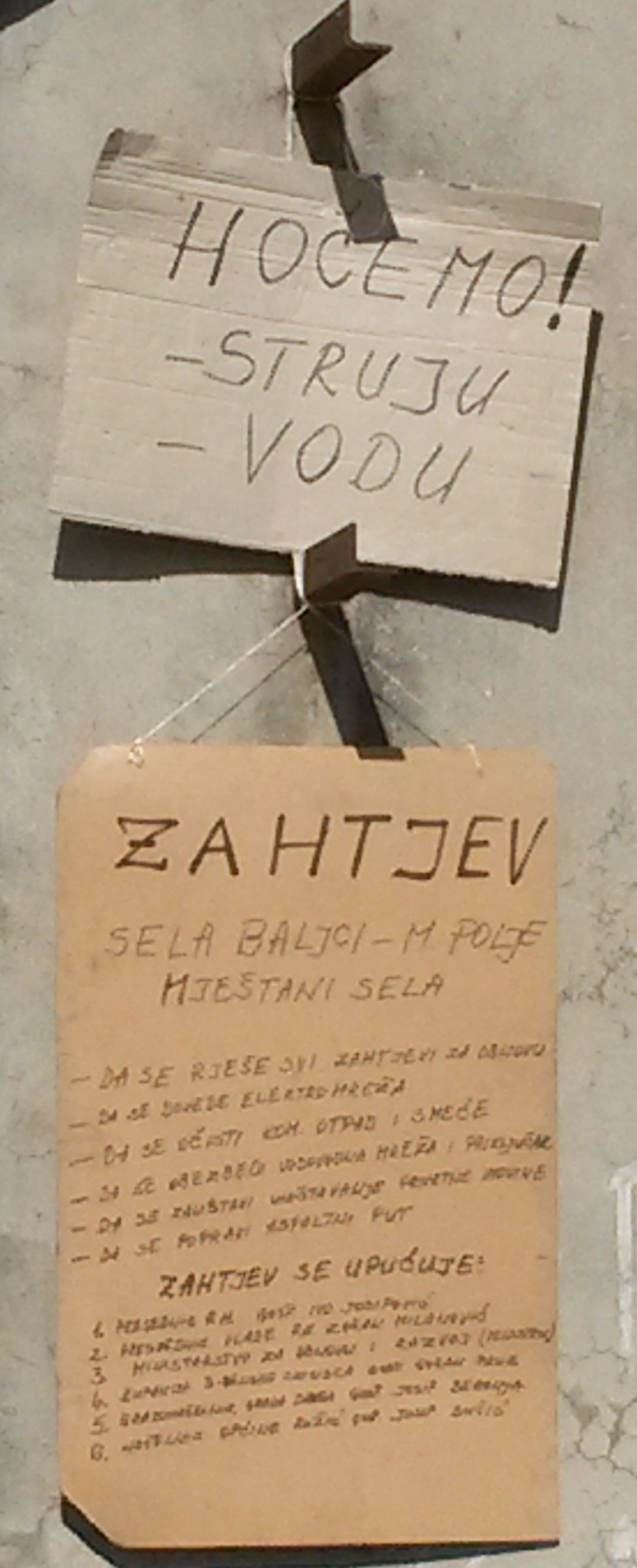 Zahtjev (Petition)